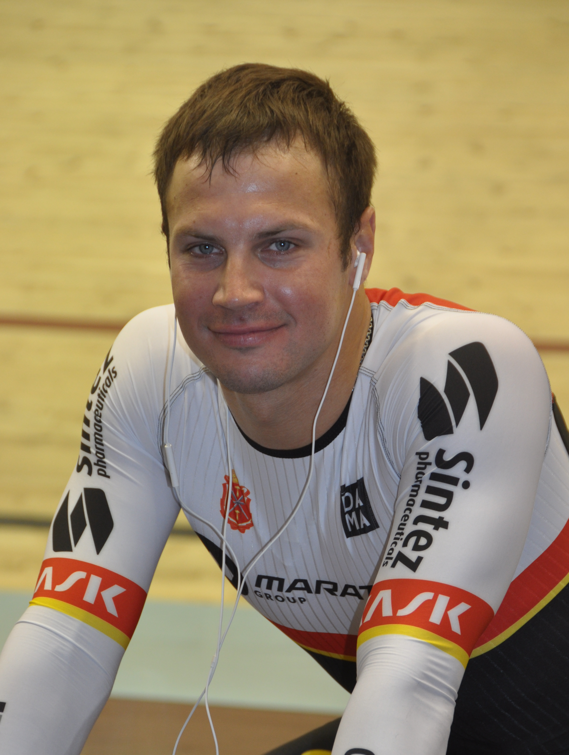 Evgeny Kovalev, russisscher Radsportler